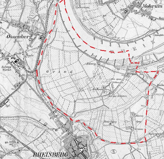 Location of Orsoy-Land